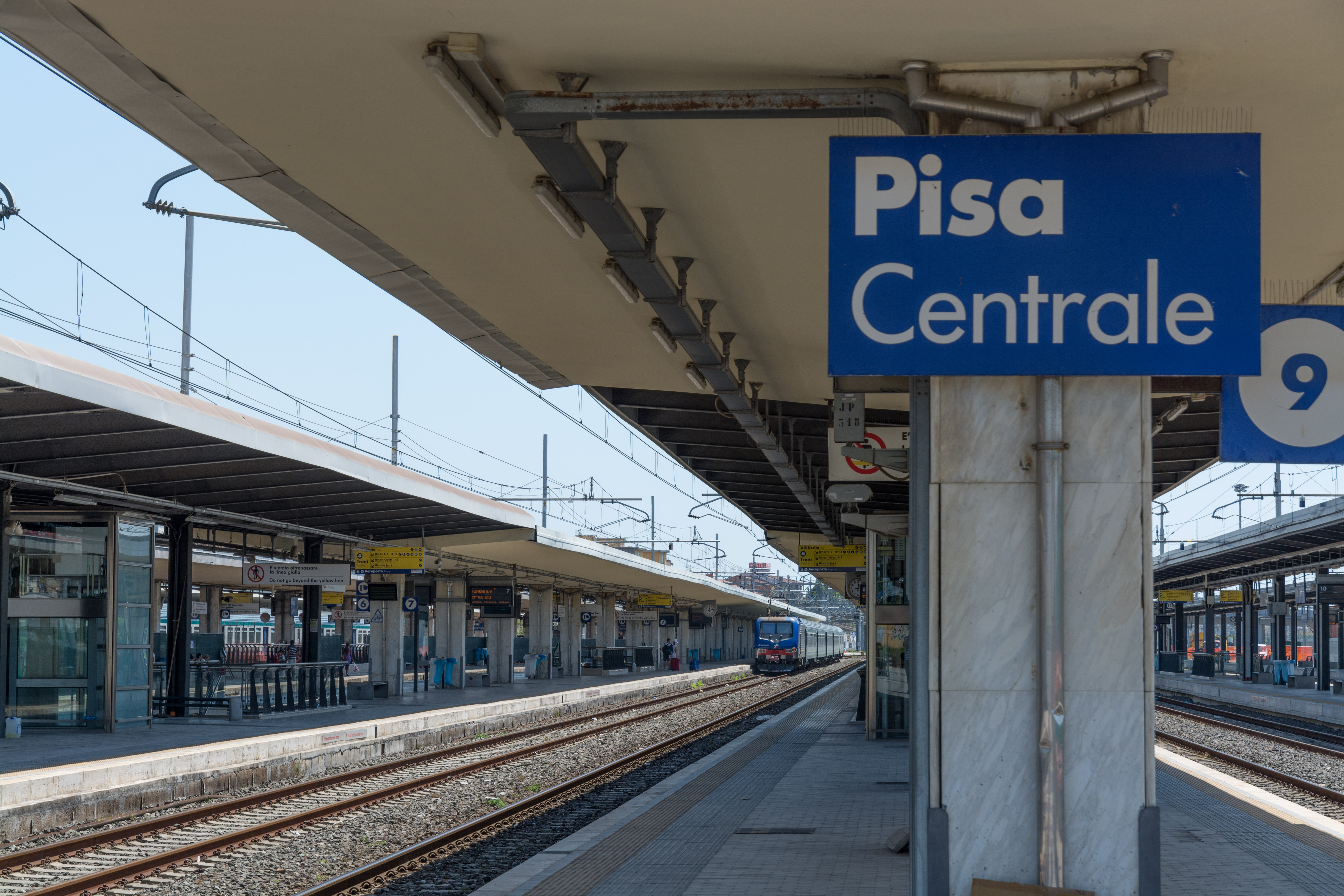 Pisa - 2016 July